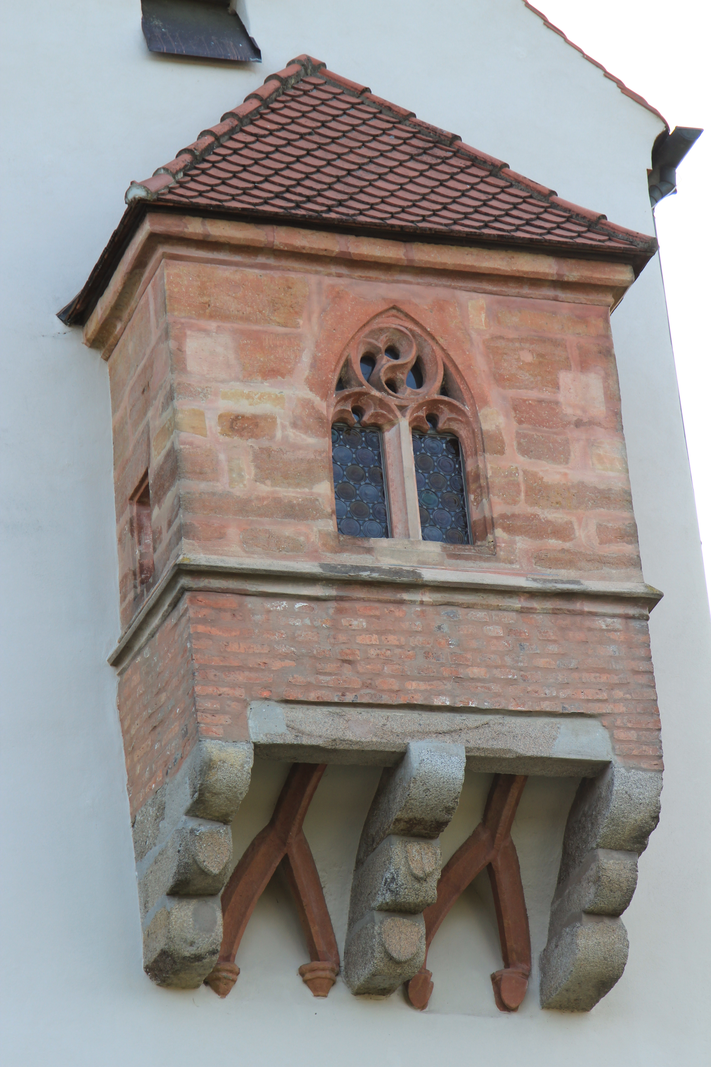 Pettendorf, Stadt Neunburg vorm Wald, Landkreis Schwandorf, Oberpfalz, Bayern; In Pettendorf befindet sich der Stammsitz der Herren von Pettendorf, ein spätgotisches Turmschlösschen. Es hat an der Ostseite einen auf drei Konsolen ruhenden gotischen Erker mit Kreuzrippengewölbe und Maßwerkfenster.